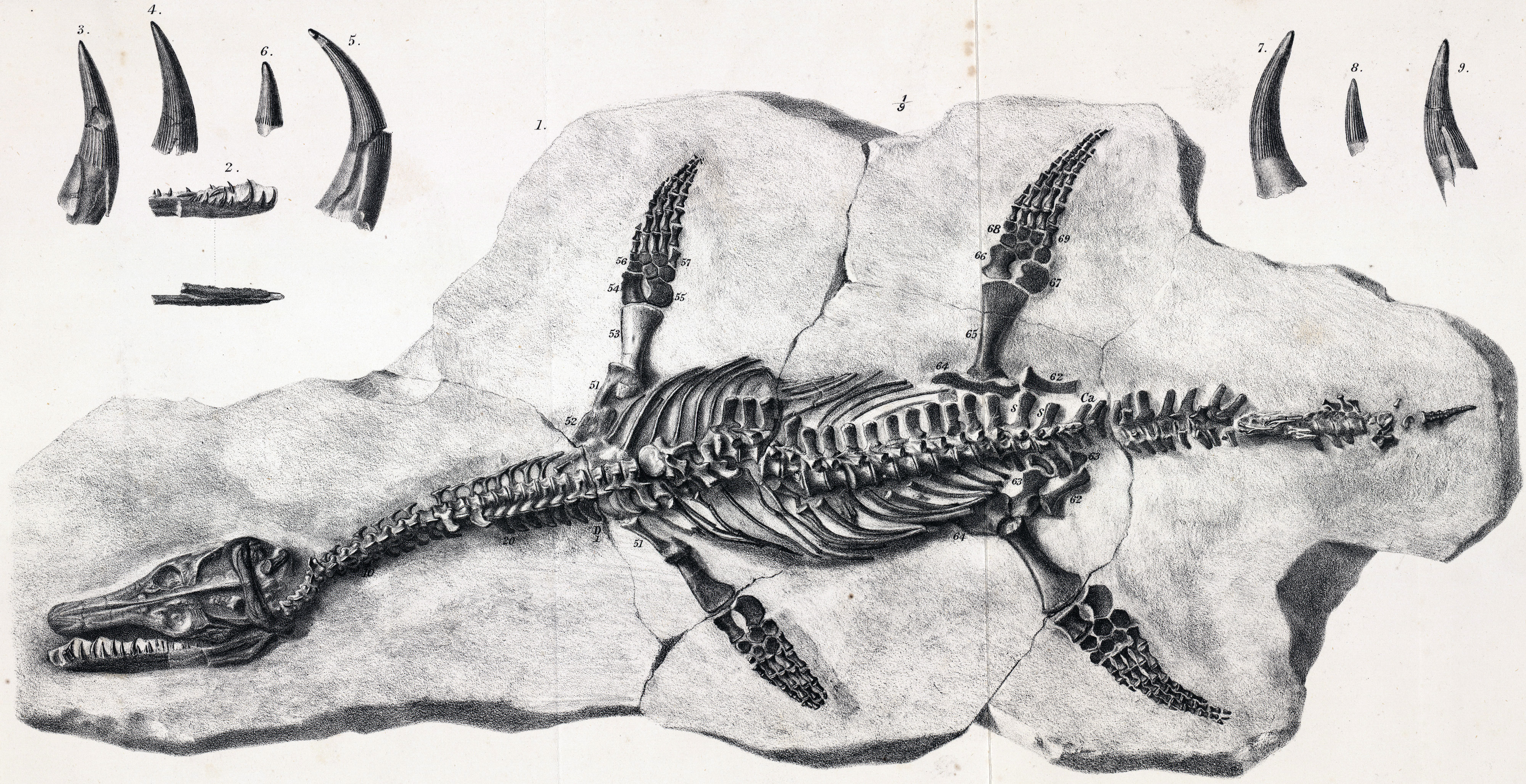 Skeleton of Archaeonectrus Plesiosaurus rostratus. Fig. 1. Skeleton (reduced to scale). Fig. 2. Right dentary bone and teeth, external and internal surfaces of lower jaw, ib. Fig. 3. Crown of the tooth of left dentary, nat. size. Fig. 4. Crown of the tooth of left dentary, nat. size. Fig. 5. Crown of fourth tooth of right dentary, nat. size. Fig. 6. Crown of hind tooth of left dentary, nat. size. Fig. 7. Crown of sixth tooth of right dentary, nat. size. Fig. 8. Crown of hind tooth of right dentary, nat. size. Fig. 9. Crown of ninth tooth of left dentary, nat. size. From the Lower Lias of Charmouth. In the British Museum.